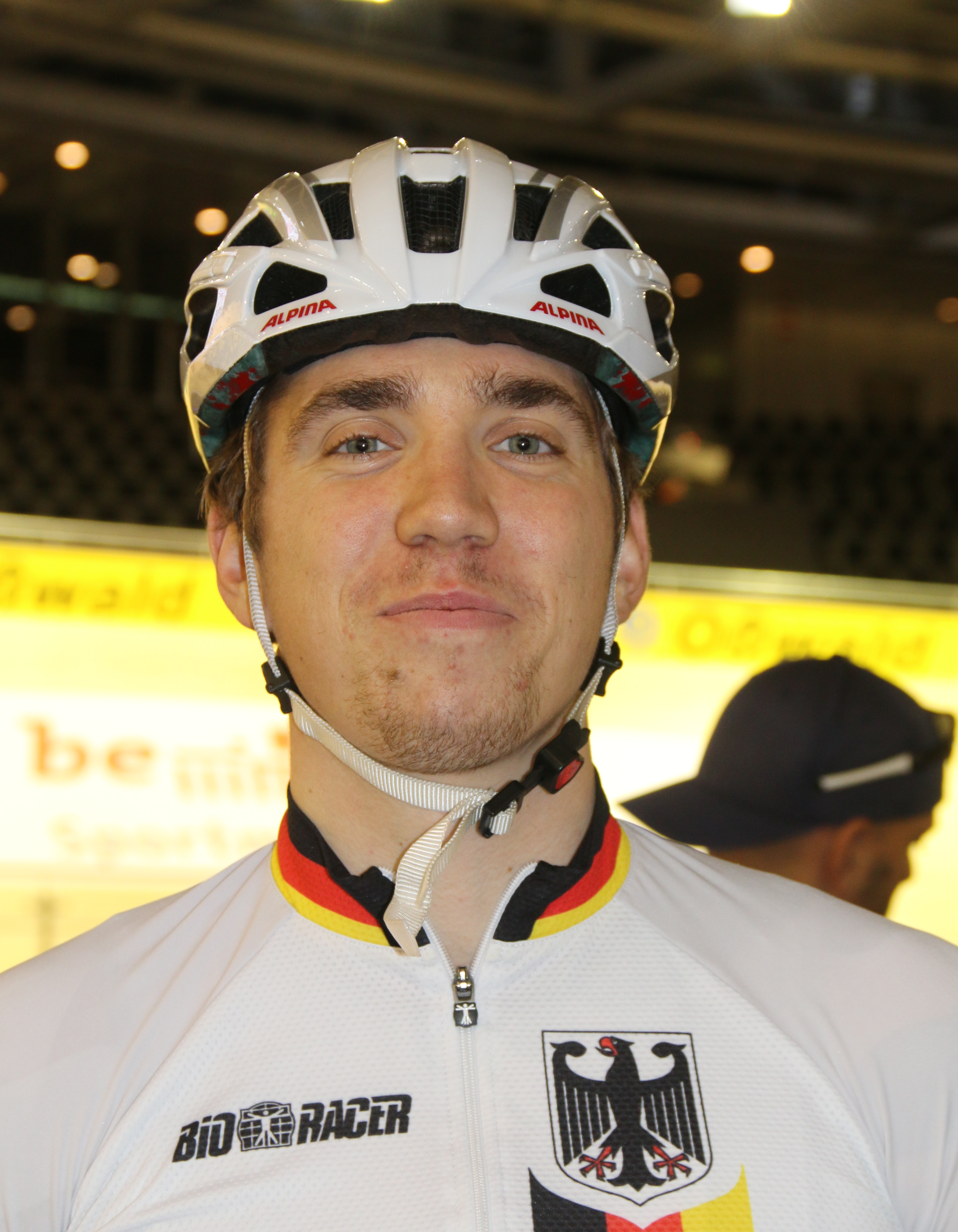 Maximilian Beyer, deutscher Radsportler